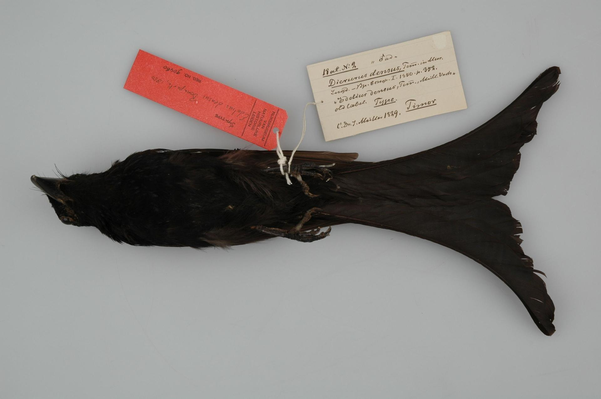 Dicrurus hottentottus densus Bonaparte, 1850